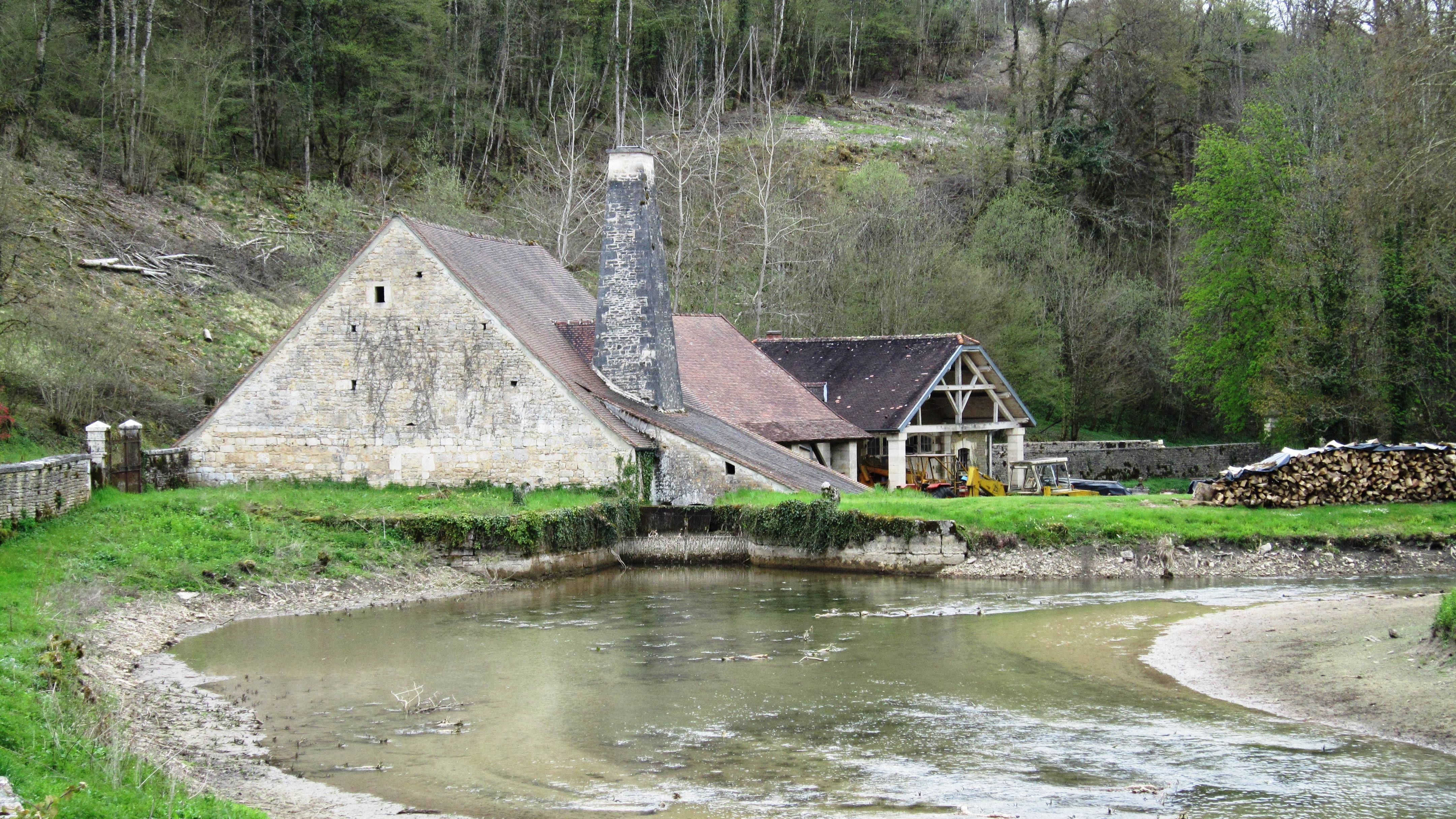 Rochefort-sur-Brévon (Côte-d'Or) : la forge d'en-bas